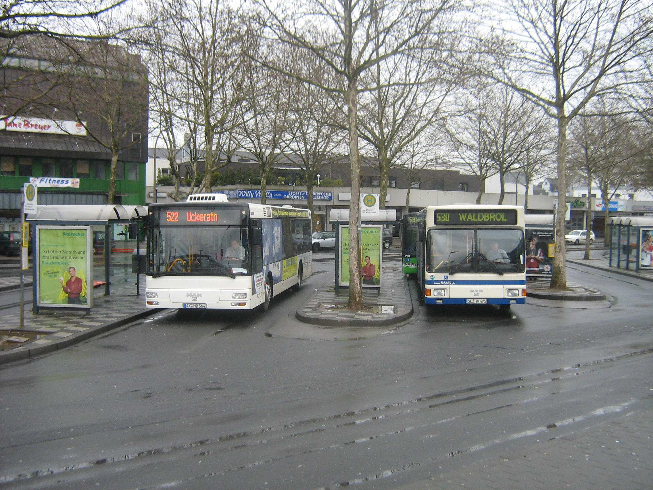 Busse am Bahnhof Hennef (Sieg)